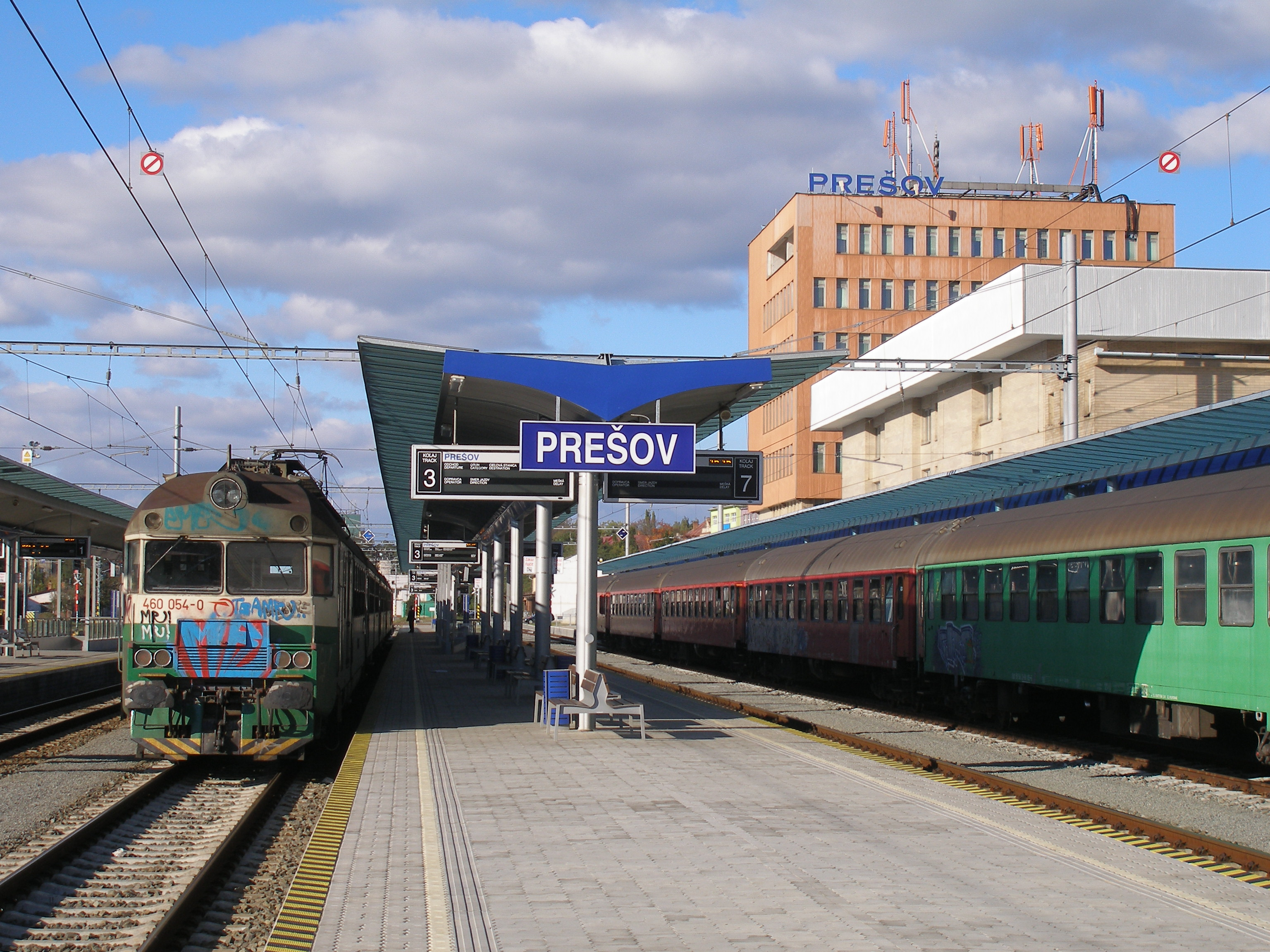 Železničná stanica v krajskom meste Prešov, región Šariš